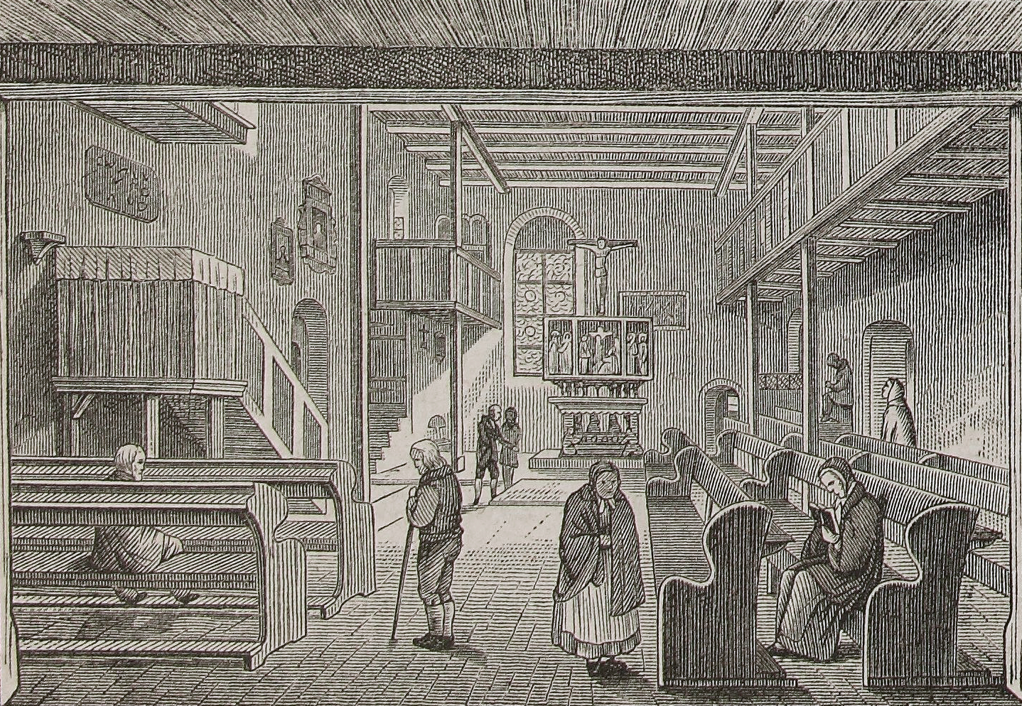 Innenraum der St.-Bartholomäus-Kirche in Dresden, Wilsdruffer Vorstadt